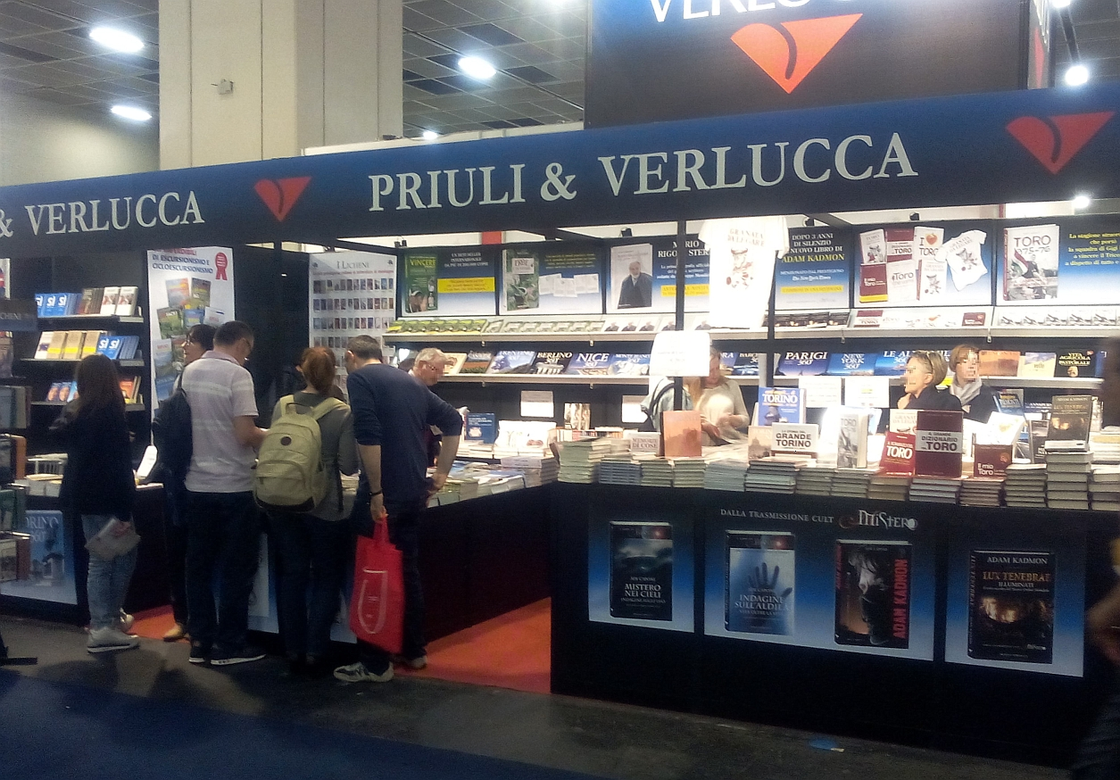 Stand edizioni Priuli e Verlucca - salone del libro 2016